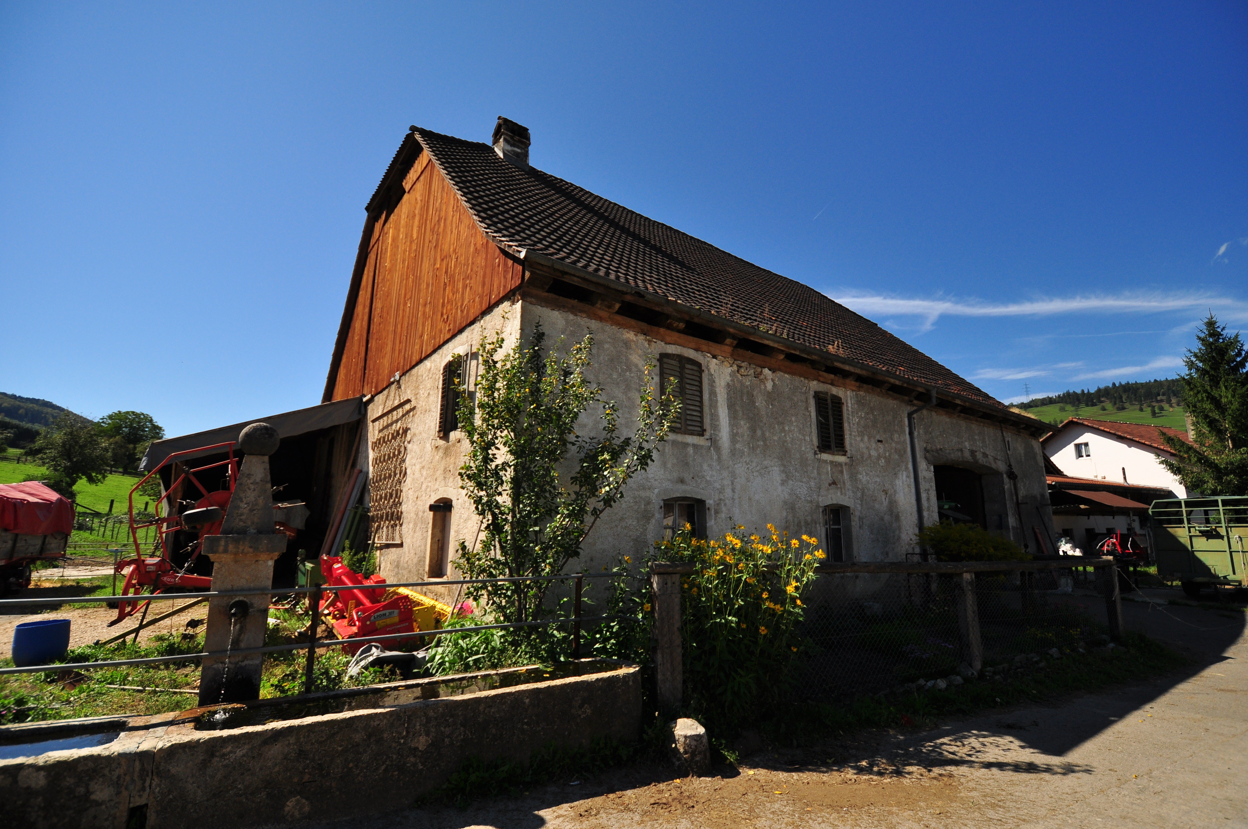 Glovelier Ferme